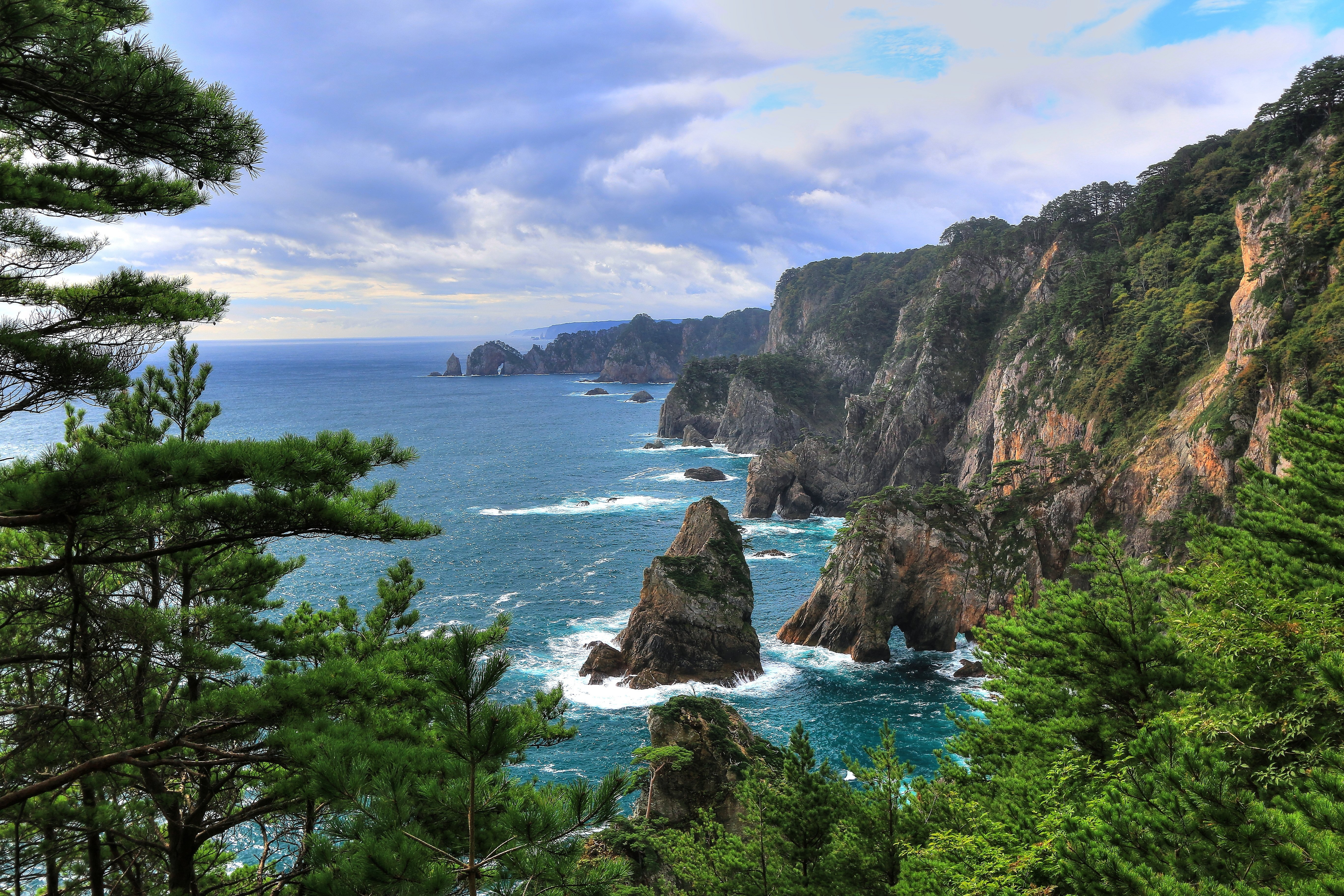 岩手県下閉伊郡田野畑村、北山崎